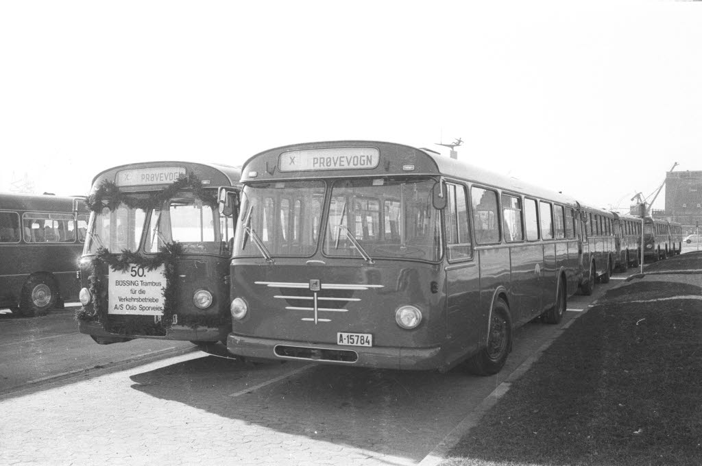 Verladung auf PRINSESSE RAGNHILD (norweg.).